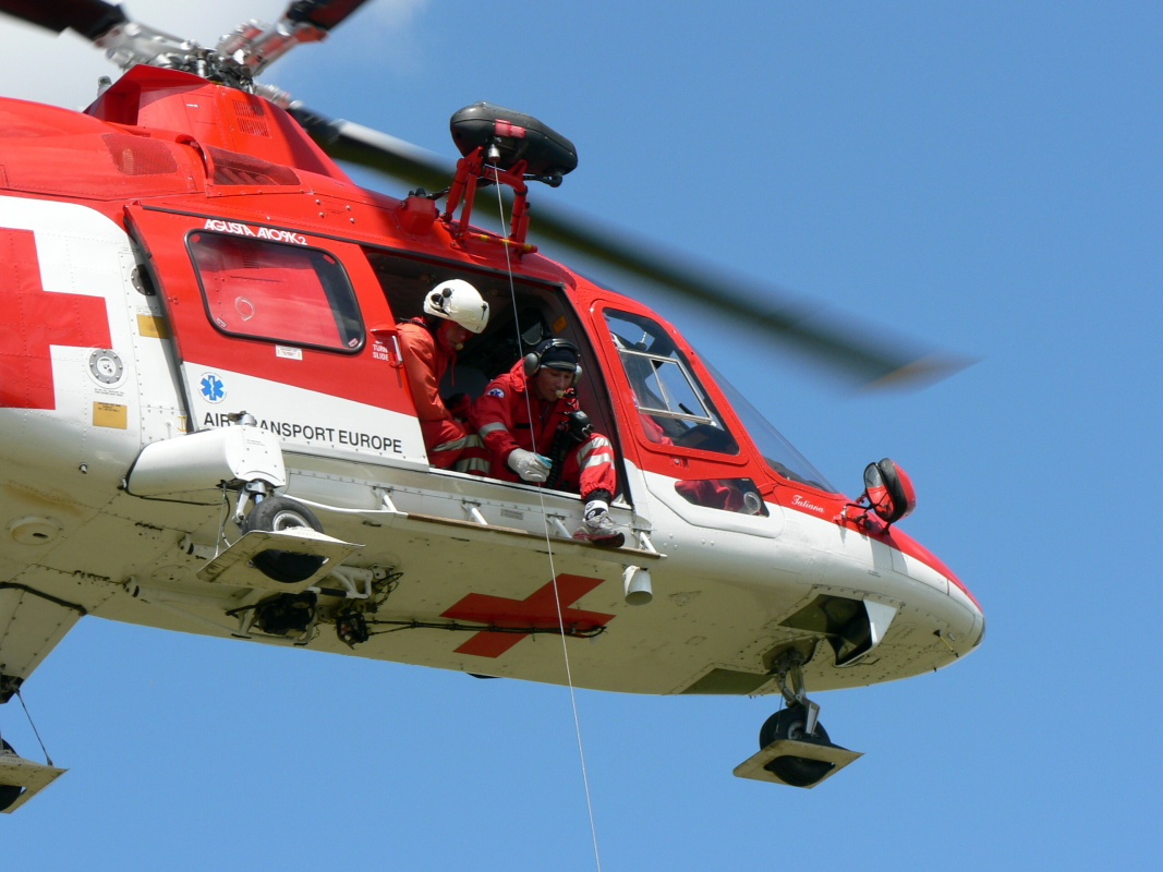 Záchranná akcia HEMS Slovakia